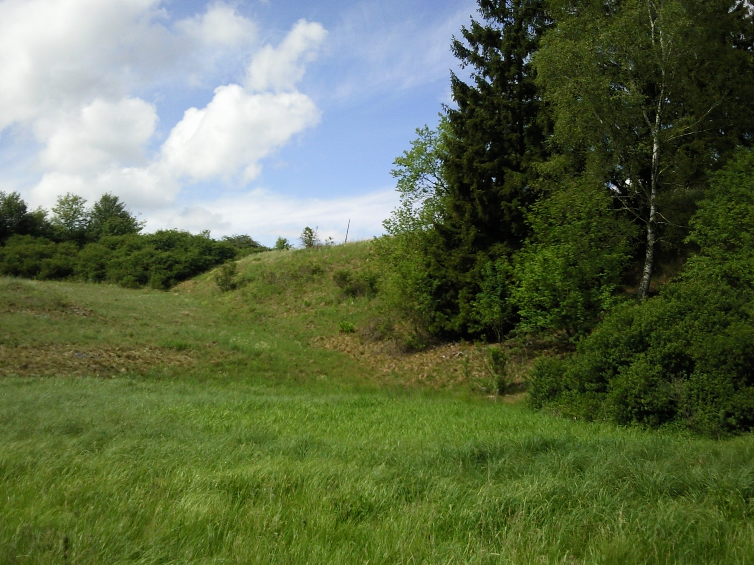 der Damm des 1752 gebrochen Glasebacher Teichs - fügt sich hier besonders gut in die Landschaft ein